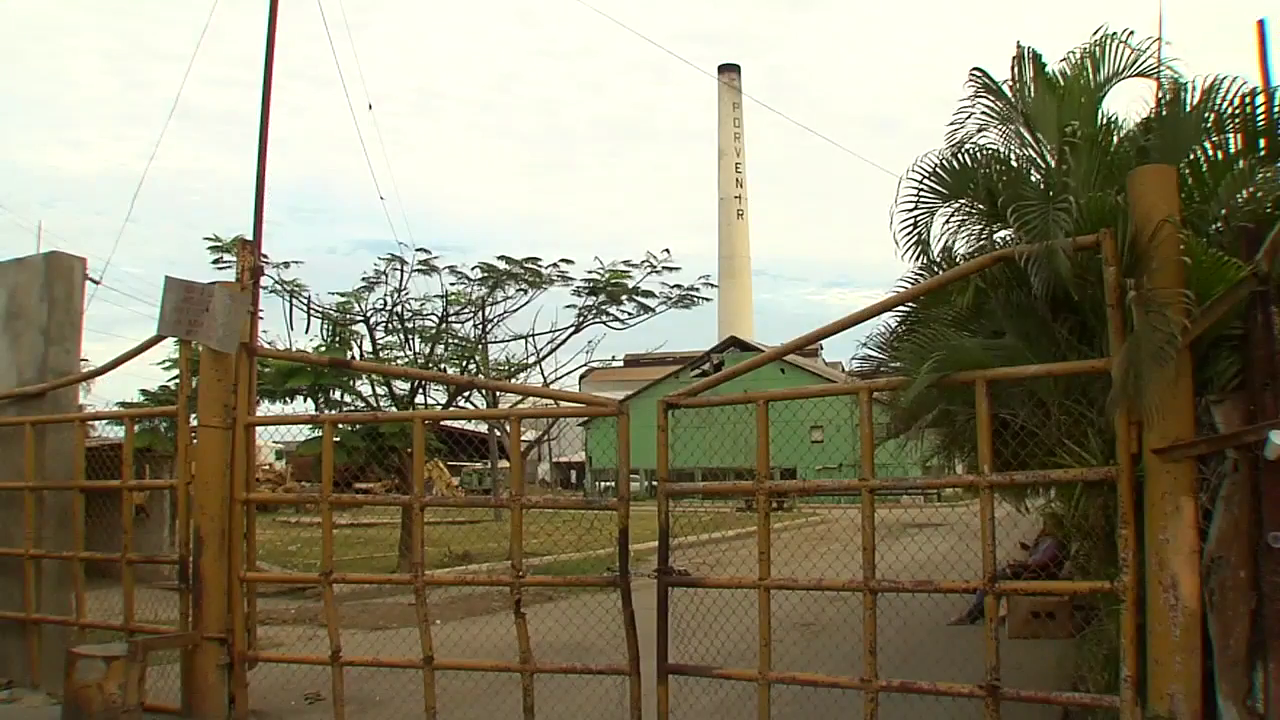 Ingenio Porvenir